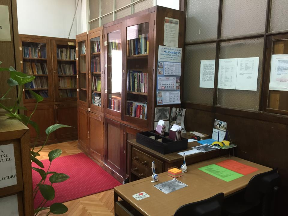 Српски (ћирилица): Унутрашњост Библиотеке